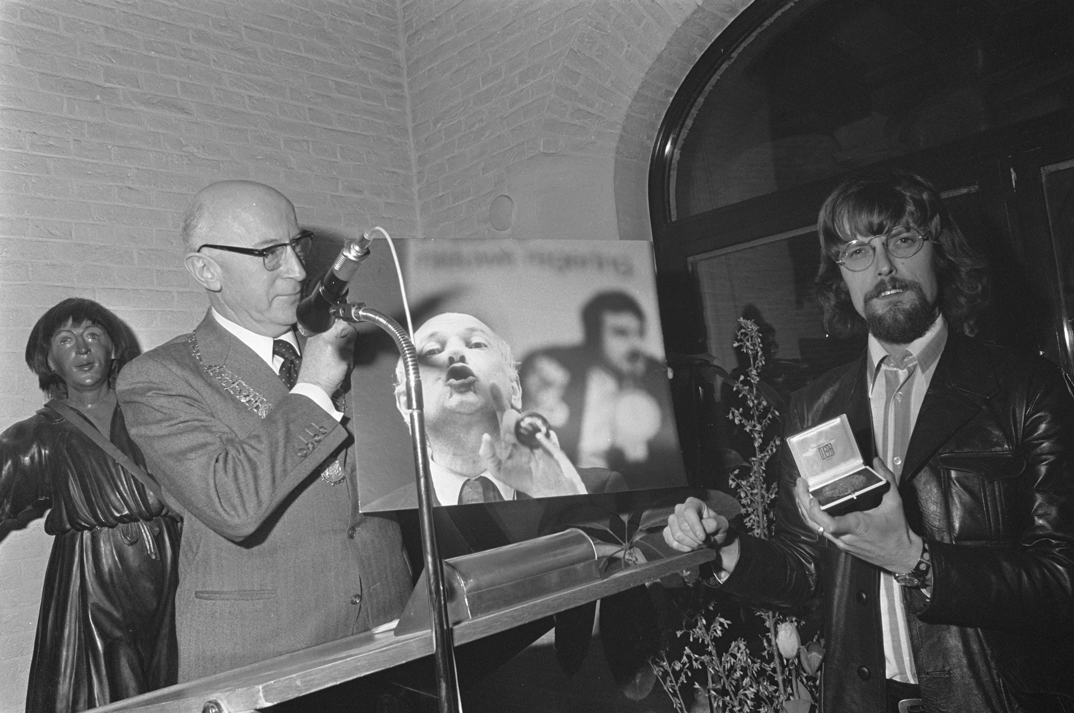 Burgemeester Samkalden verricht opening World Press Photo en reikt prijzen uit, Samkalden geeft prijs aan Vincent Mentzel.